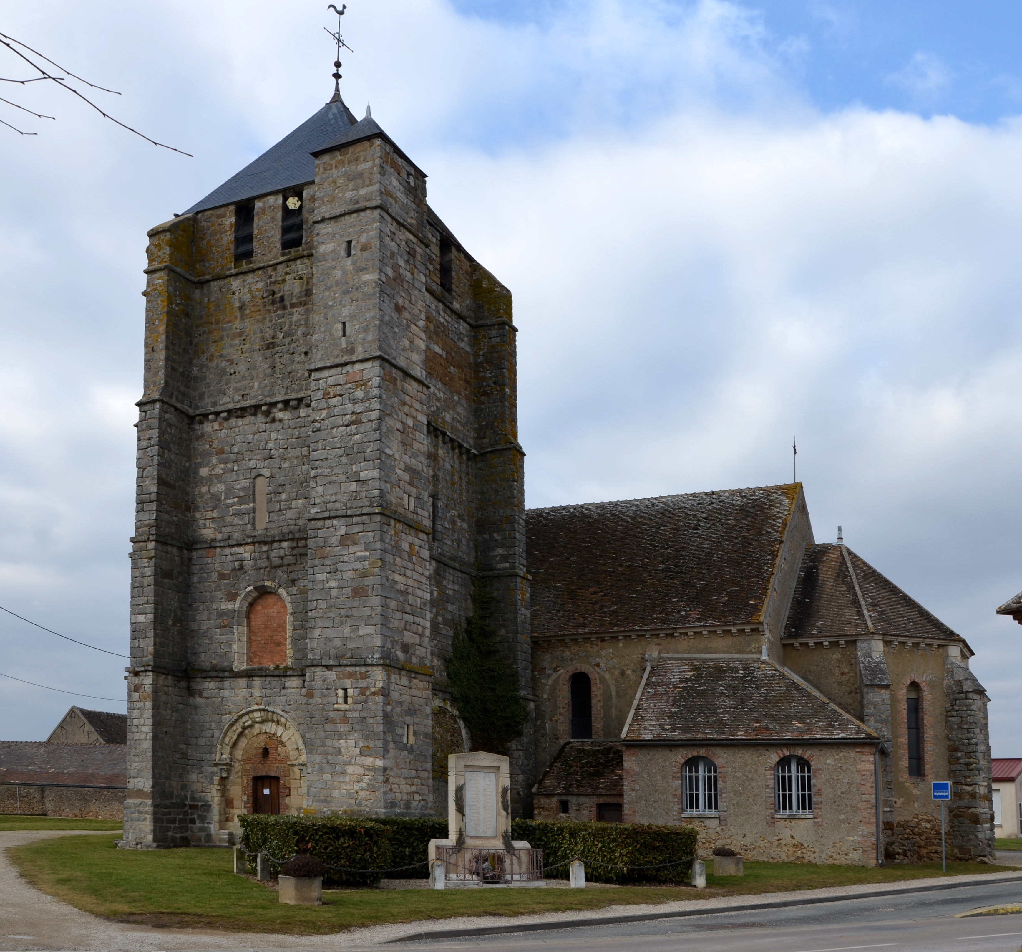 Eglise de Lixy, Yonne, France